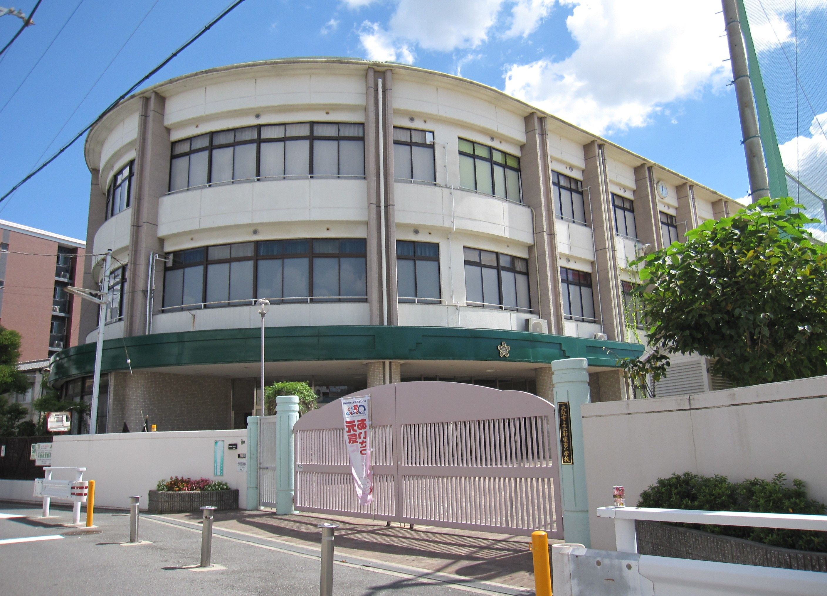 大阪市立三軒家西小学校